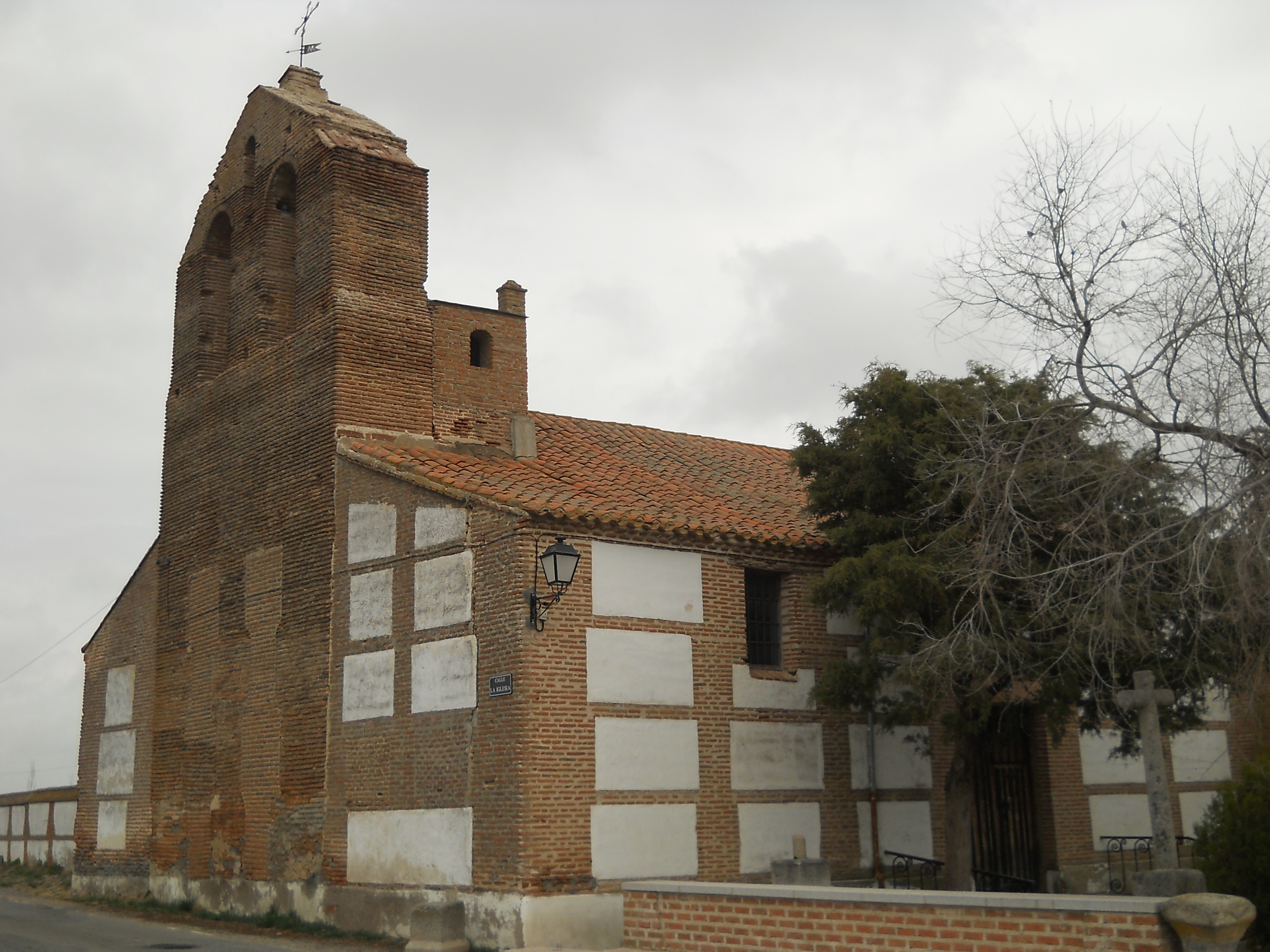 Chiesa di san Martino, Narros de Saldueña, Ávila, Spagna